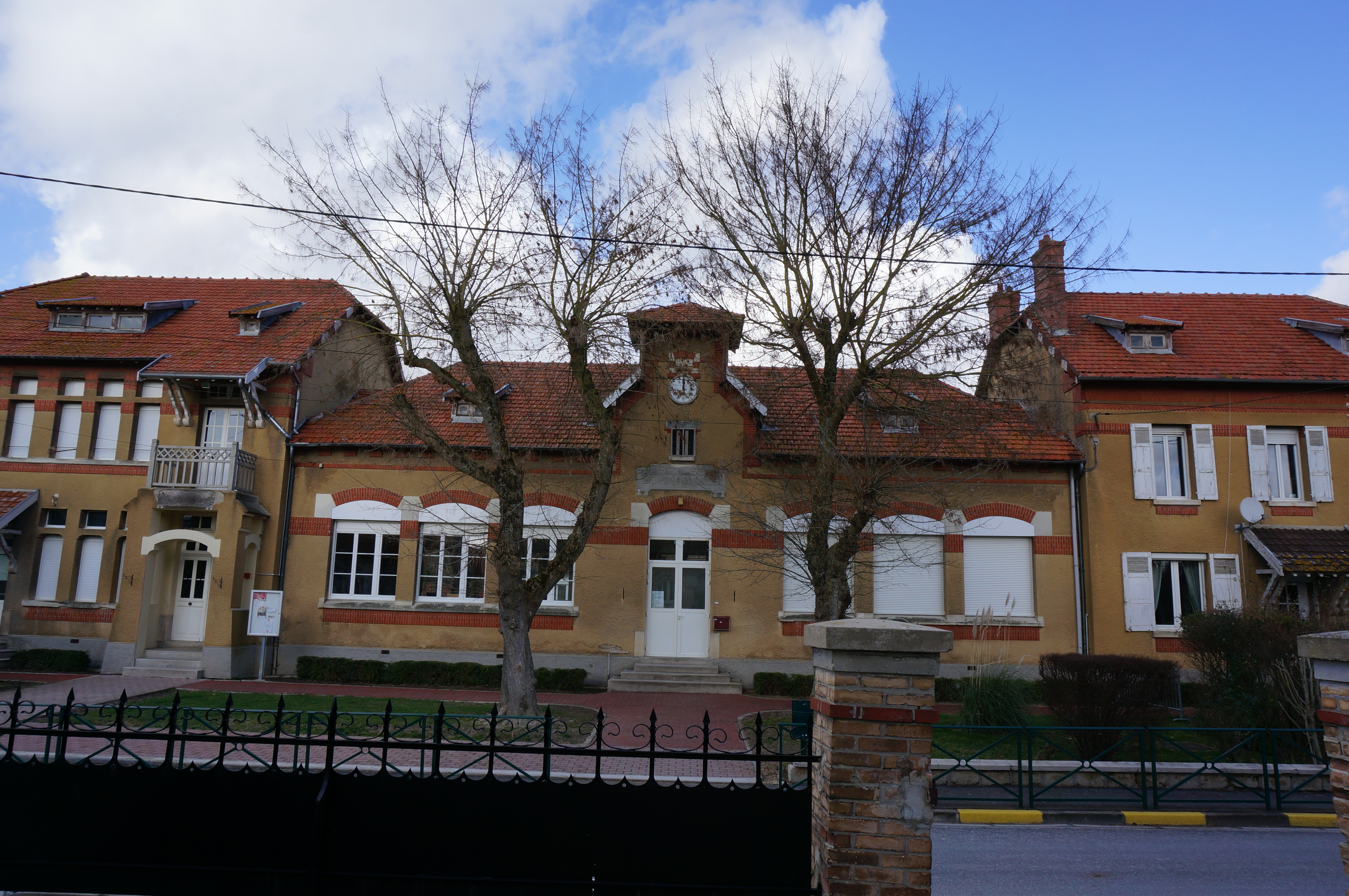 Vues d'Amifontaine.